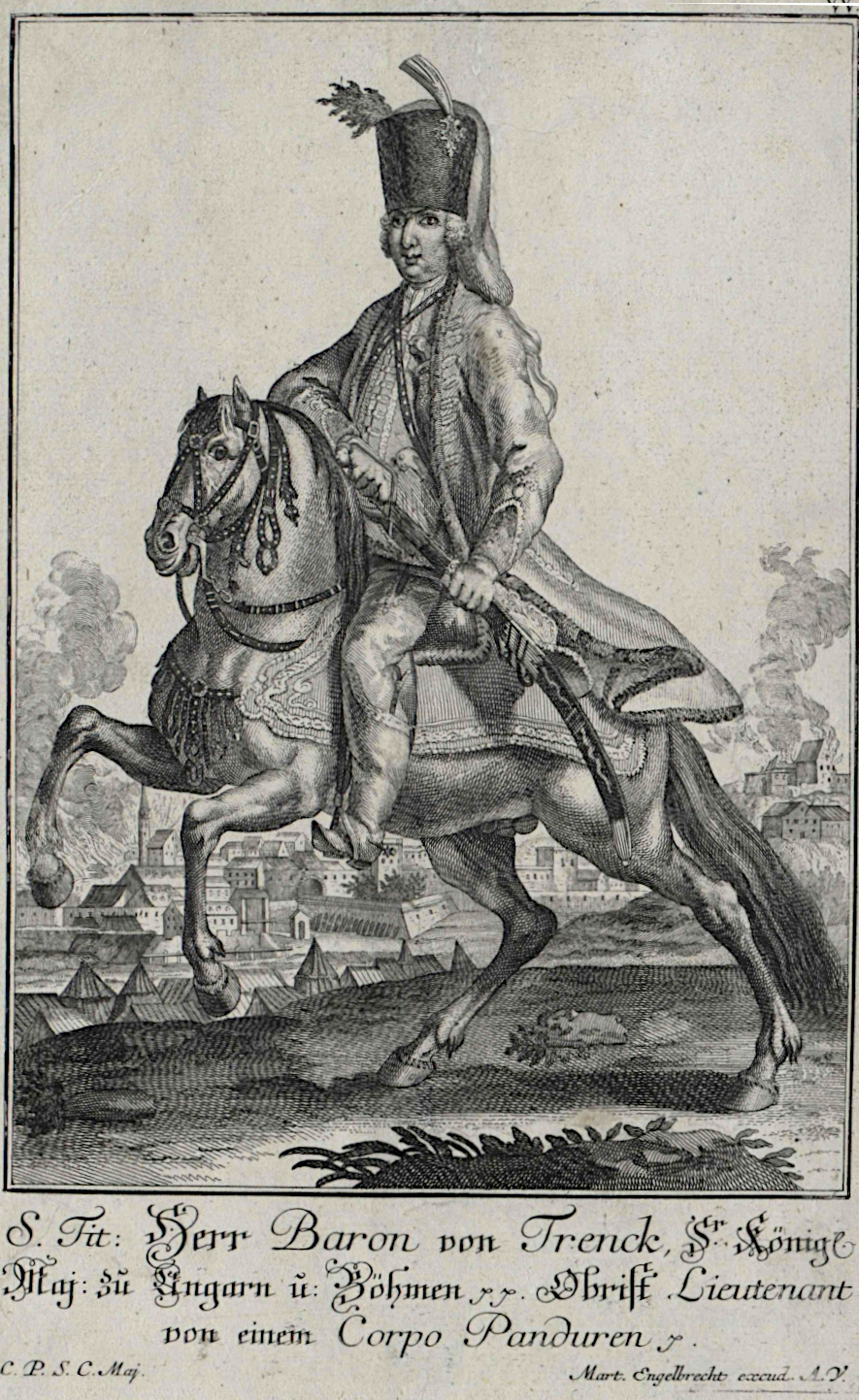 Trenck, Franz Freiherr (1711 - 1749)